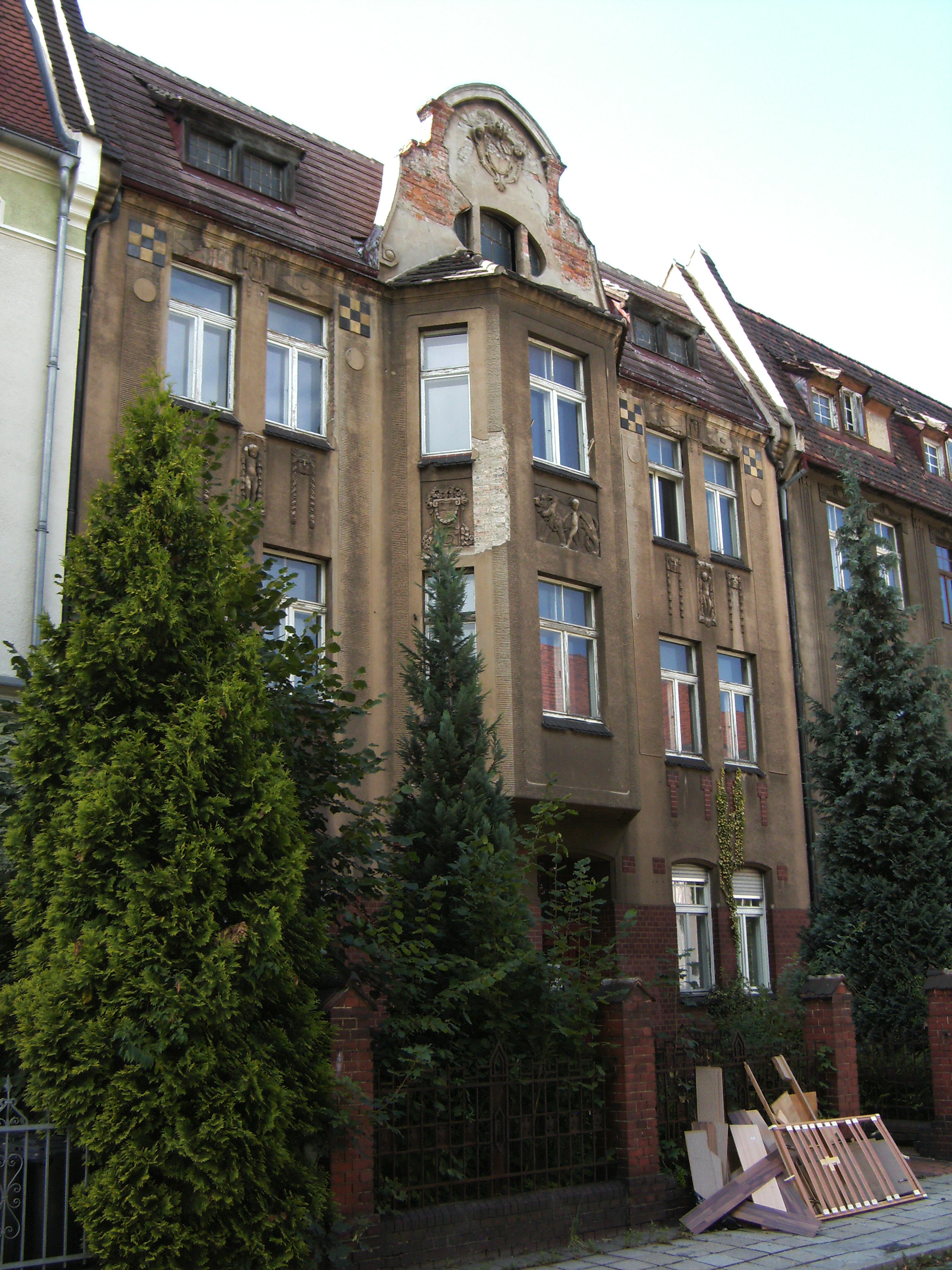 Wernerstr. 42